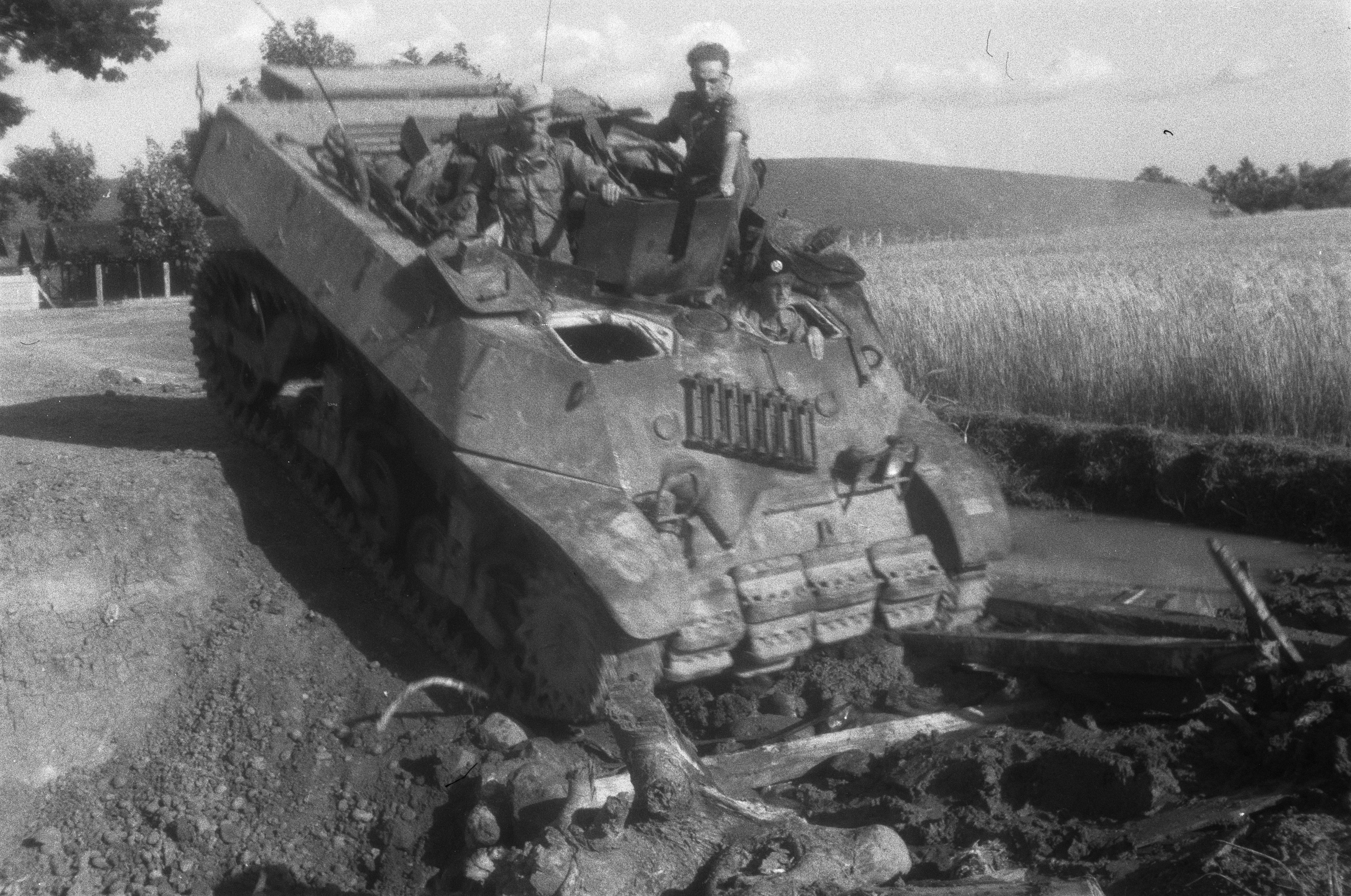 Collectie / Archief : Fotocollectie Dienst voor Legercontacten Indonesië Reportage / Serie : [DLC] Actie met tanks bij Toba en omstreken Beschrijving : [2e Eskadron Vechtwagens] Datum : maart 1949 Locatie : Indonesië, Nederlands-Indië, Sumatra Fotograaf : Burgt, Th. van de / DLC Auteursrechthebbende : Nationaal Archief Materiaalsoort : Negatief (zwart/wit) Nummer archiefinventaris : bekijk toegang 2.24.04.02 Bestanddeelnummer : 264